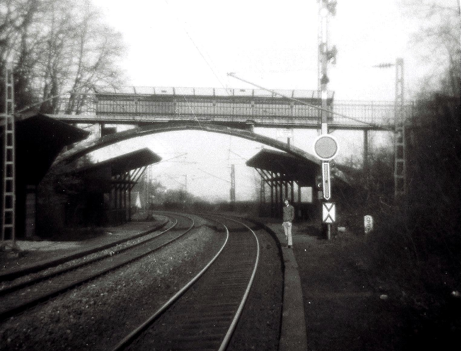 Ansicht des alten Haltepunkts Heslach an der Gäubahn 1973-aufgenommen mit meiner Instamatic "Point&Shoot" Kassettenkamera - Gert D. Geissler/Stuttgart